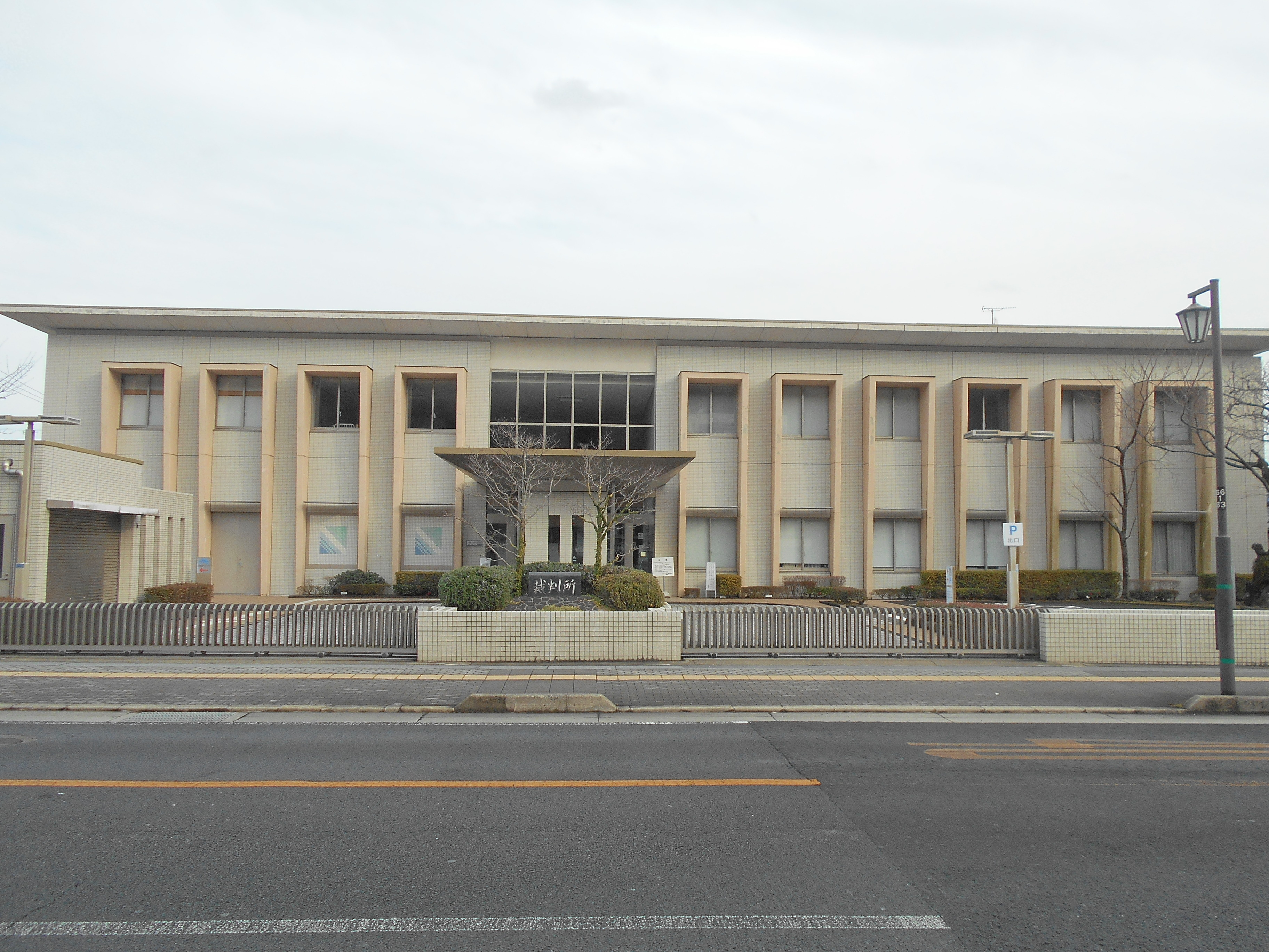 新宮簡易裁判所 和歌山地方裁判所新宮支部 和歌山家庭裁判所新宮支部